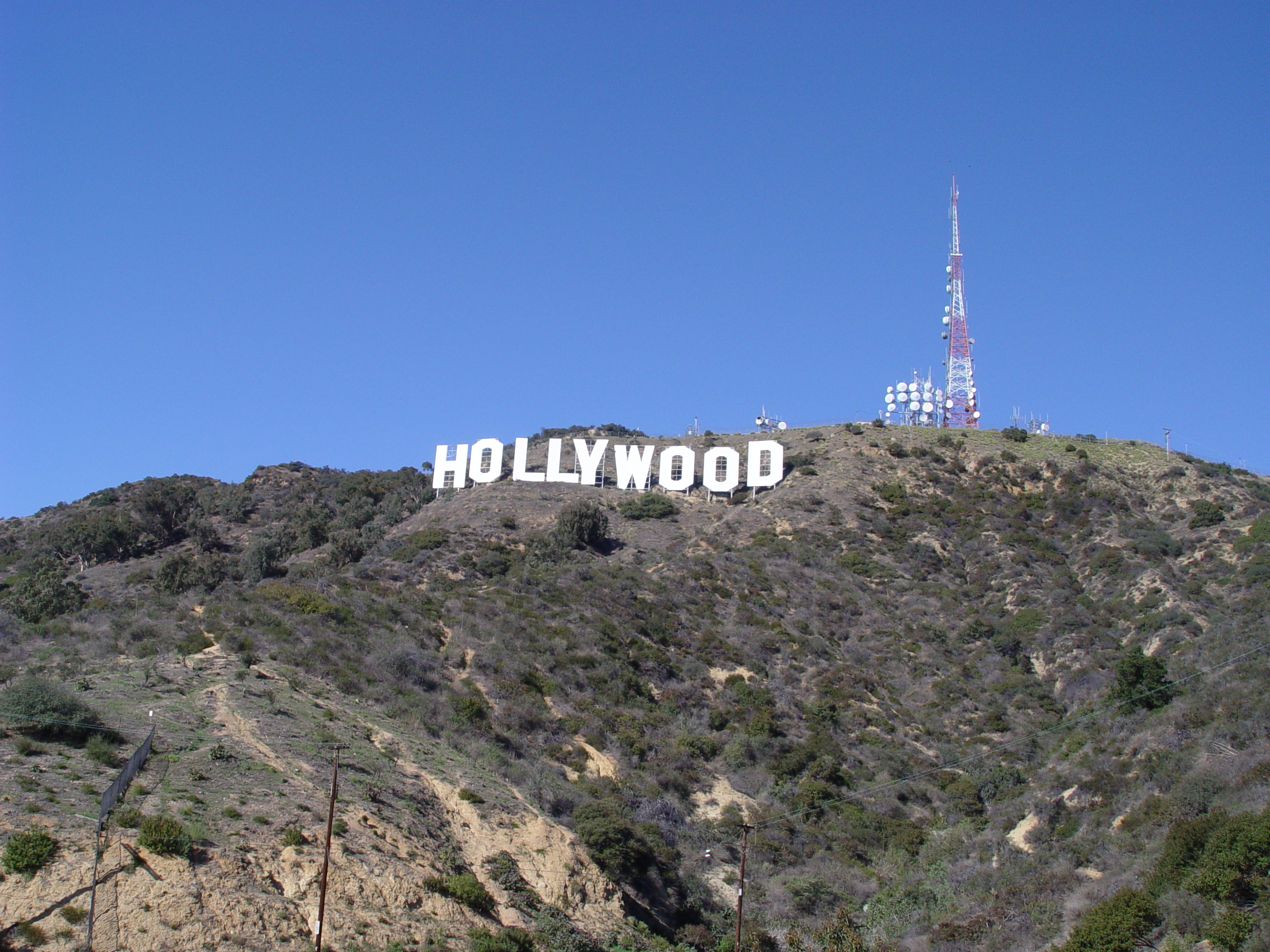 Hollywood-Sign in Hollywood/Los Angeles